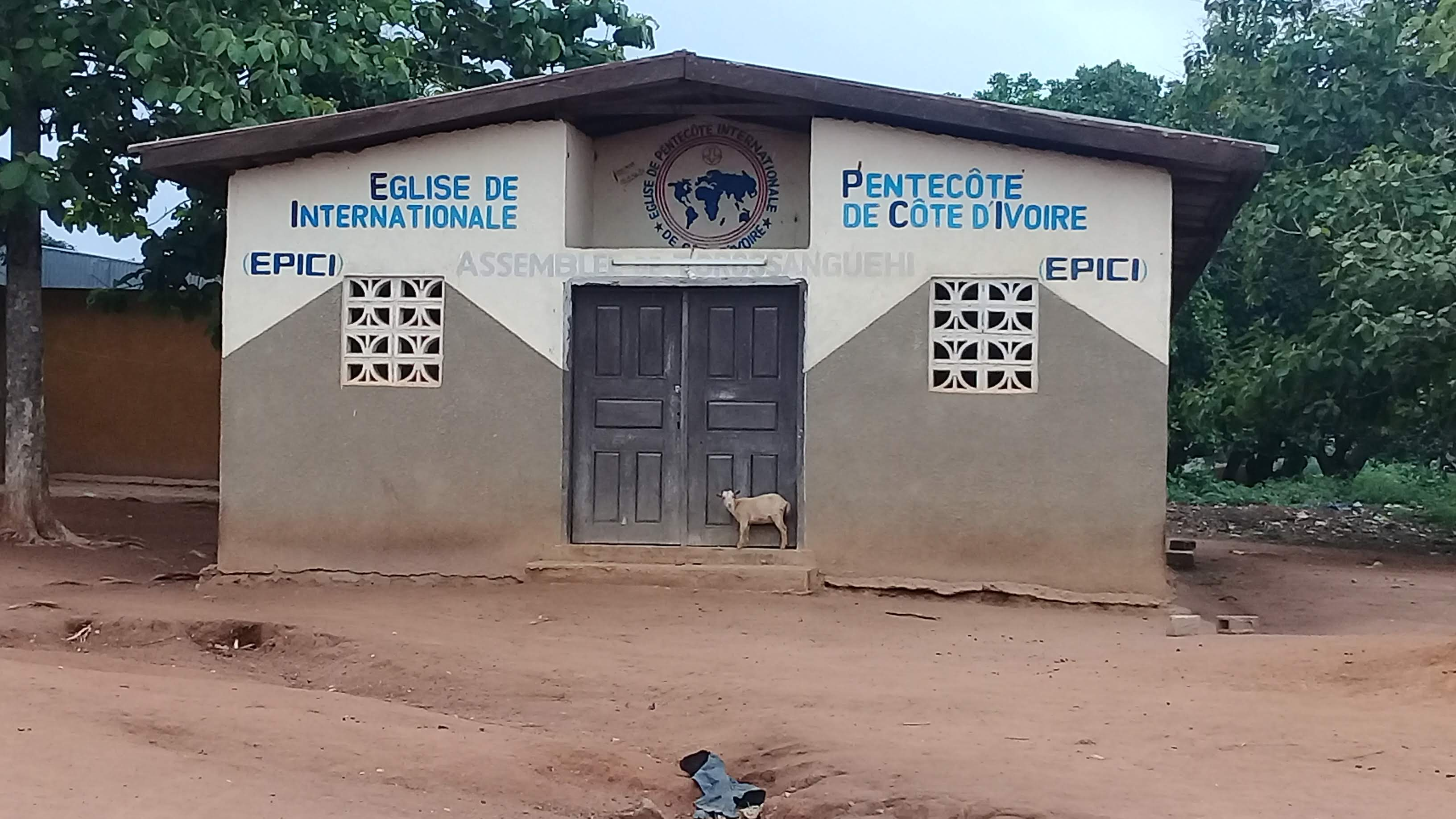 Torossanguéhi est une localité du nord-est de la Côte d'Ivoire